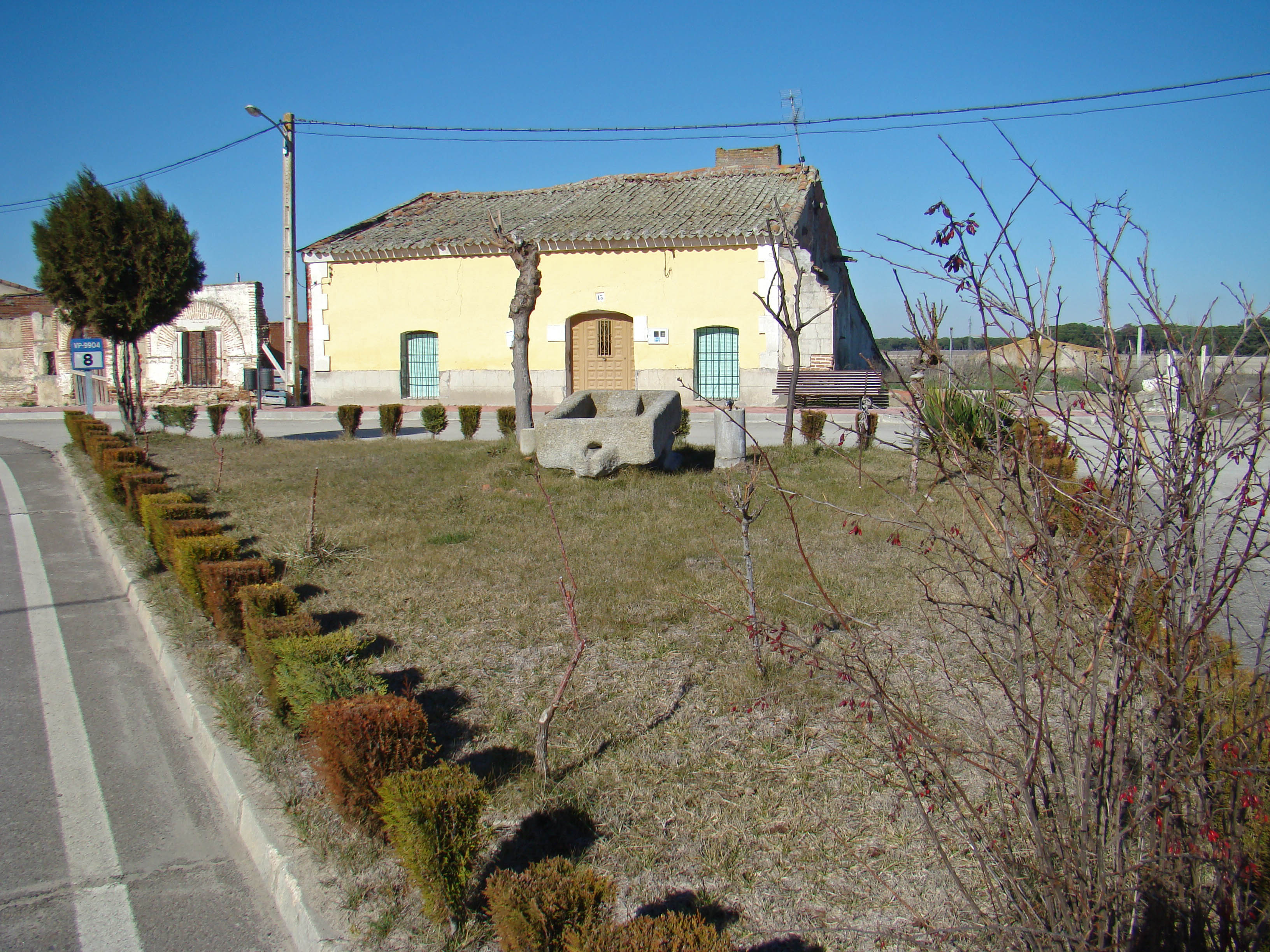 Moraleja de las Panaderas en la provincia de Valladolid, España. Pilón antiguo que se conserva en uno de los jardines del pueblo.